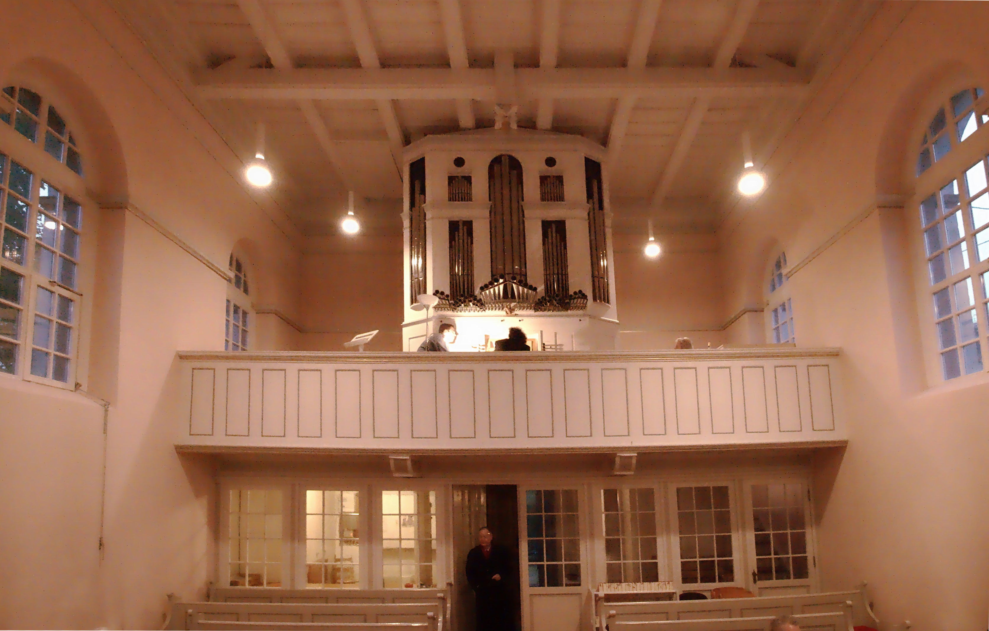 Die spanische Orgel in der Evangelischen Pfarrkirche in Züsch (Hunsrück)